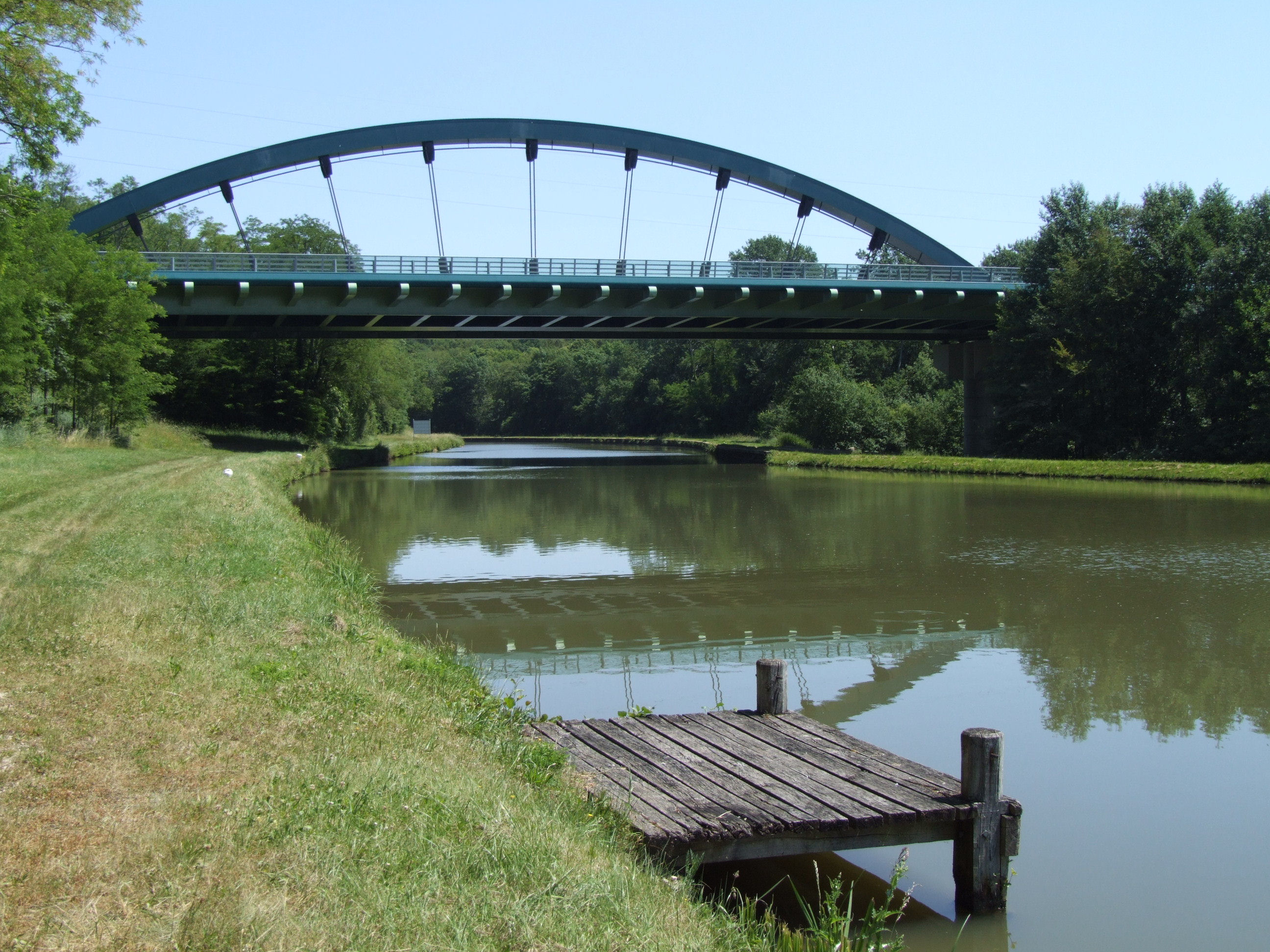 Canal de Briare - Le canal et le pont en "corde d'arc" ("bow-string") de l'autoroute A77. A cet endroit le canal est hors du lit de la Trézée, qui passe sous le pont à droite du canal. Vue vers l'amont.